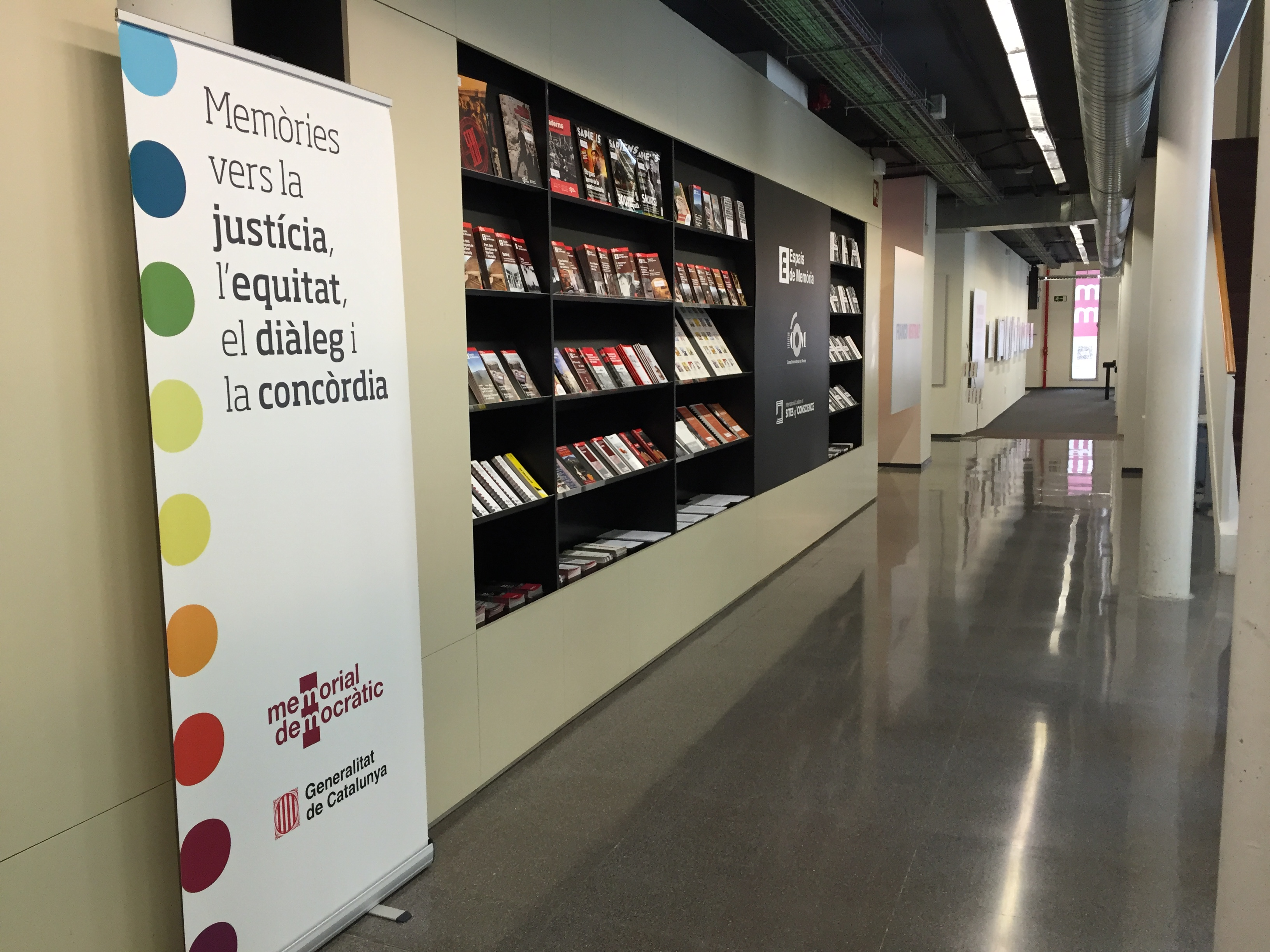 hall memorial democràtic